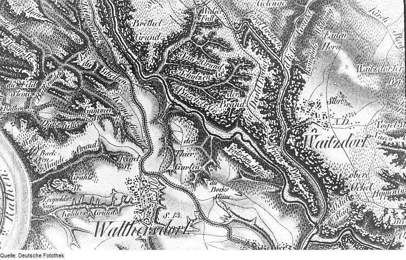 Original image description from the Deutsche Fotothek Porschdorf-Waltersdorf. Oberreit, Sect. Stolpen, 1821/22